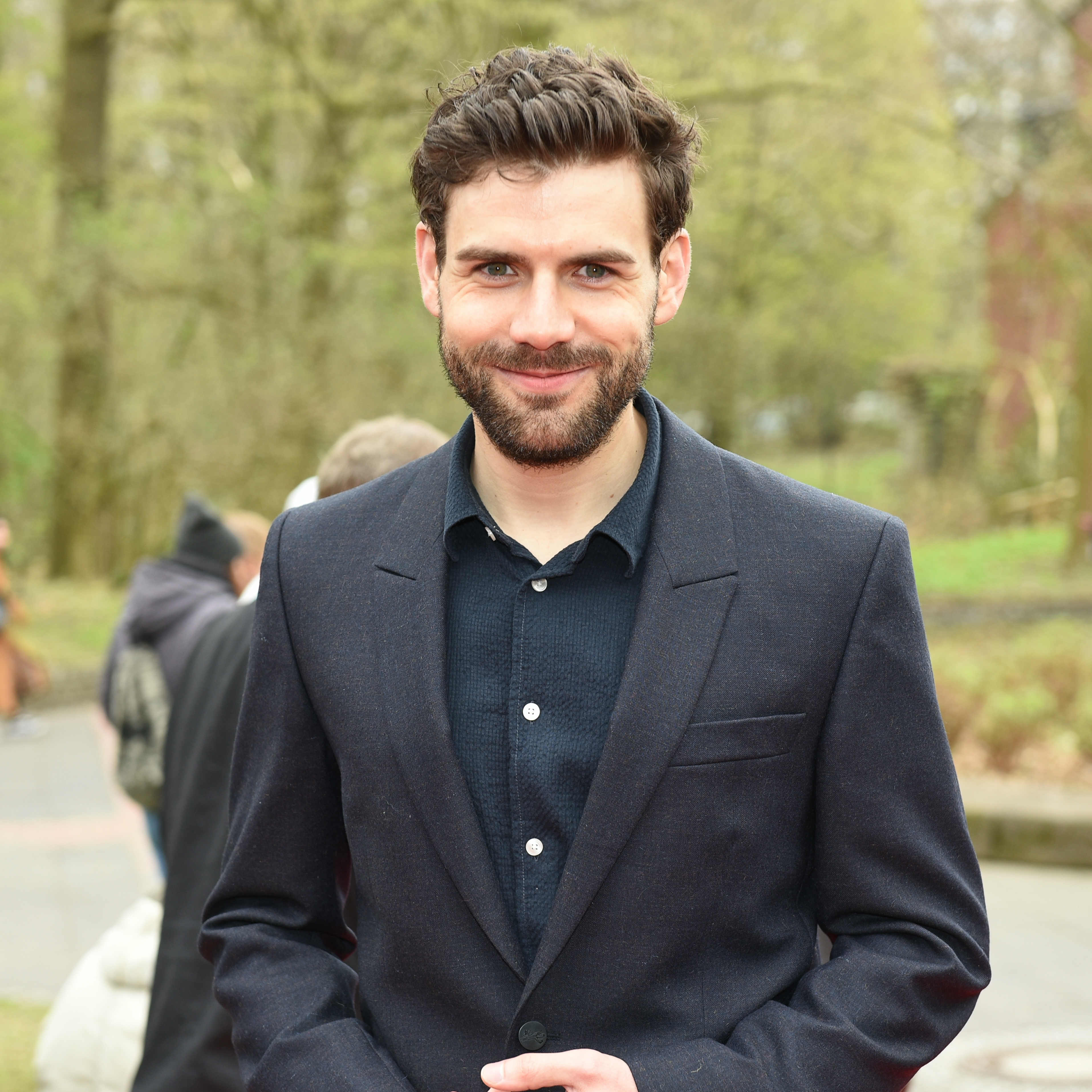 Verleihung des Grimme-Preises 2019.